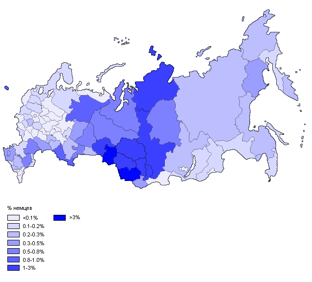 карта доли немцев по отношению к остальному населению РФ по регионам, 2002 год